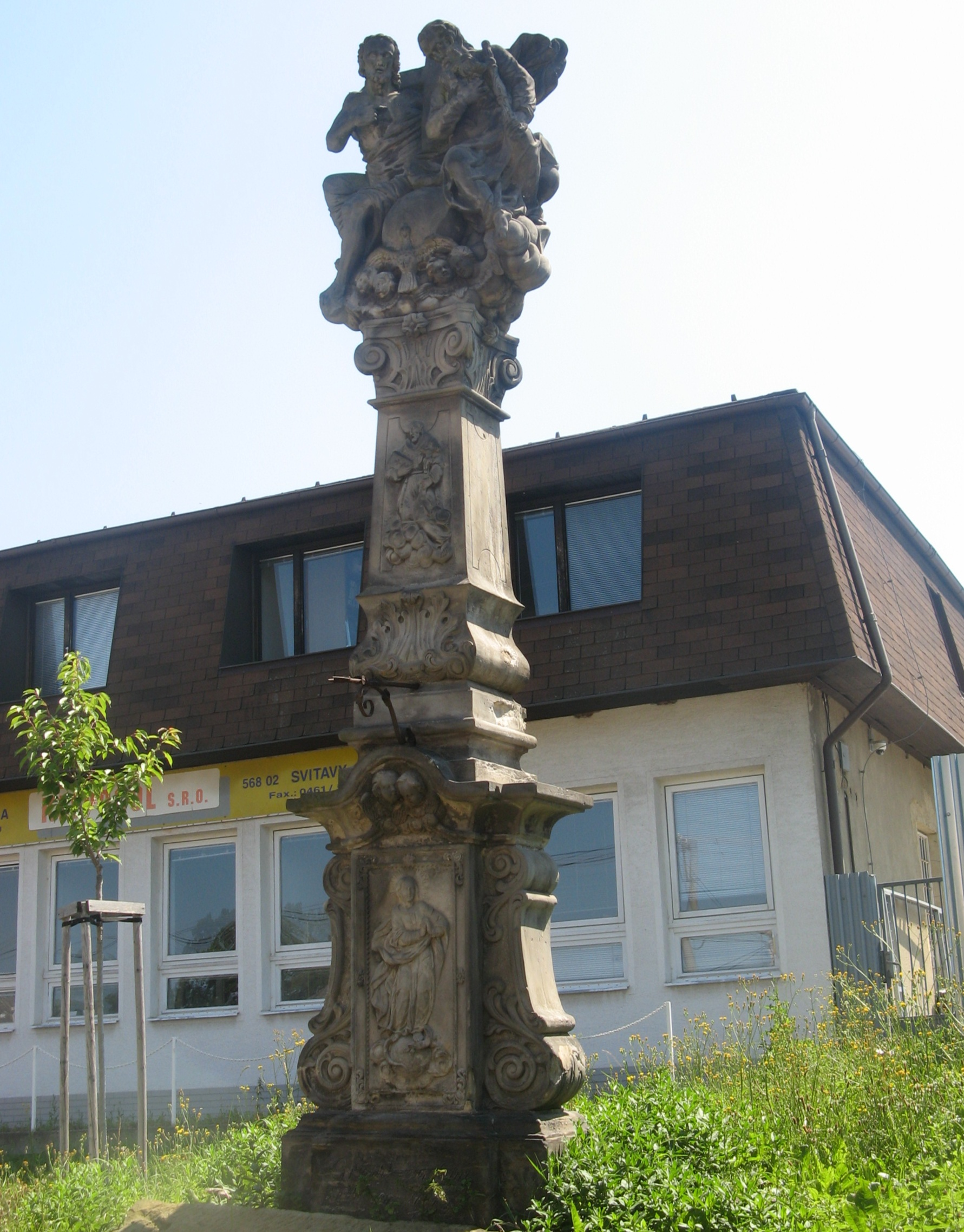 Socha na ul. Hlavní č.p. 322, Svitavy-Lačnov, Czech republic